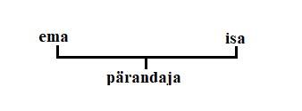 Pärandajal ei ole ühtegi esimese järjekorra pärijat (alanejaid sugulasi), seega pärivad teise järjekorra pärijad (pärimise järjekorra põhimõte). Pärandaja ema ja isa pärivad võrdsetes osades ehk kumbki ½.